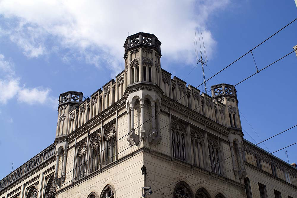 Wrocław Stare Miasto, ul. Krupnicza 15 - Nowa Giełda, obecnie Klub Sportowy "Gwardia", 1865-1867